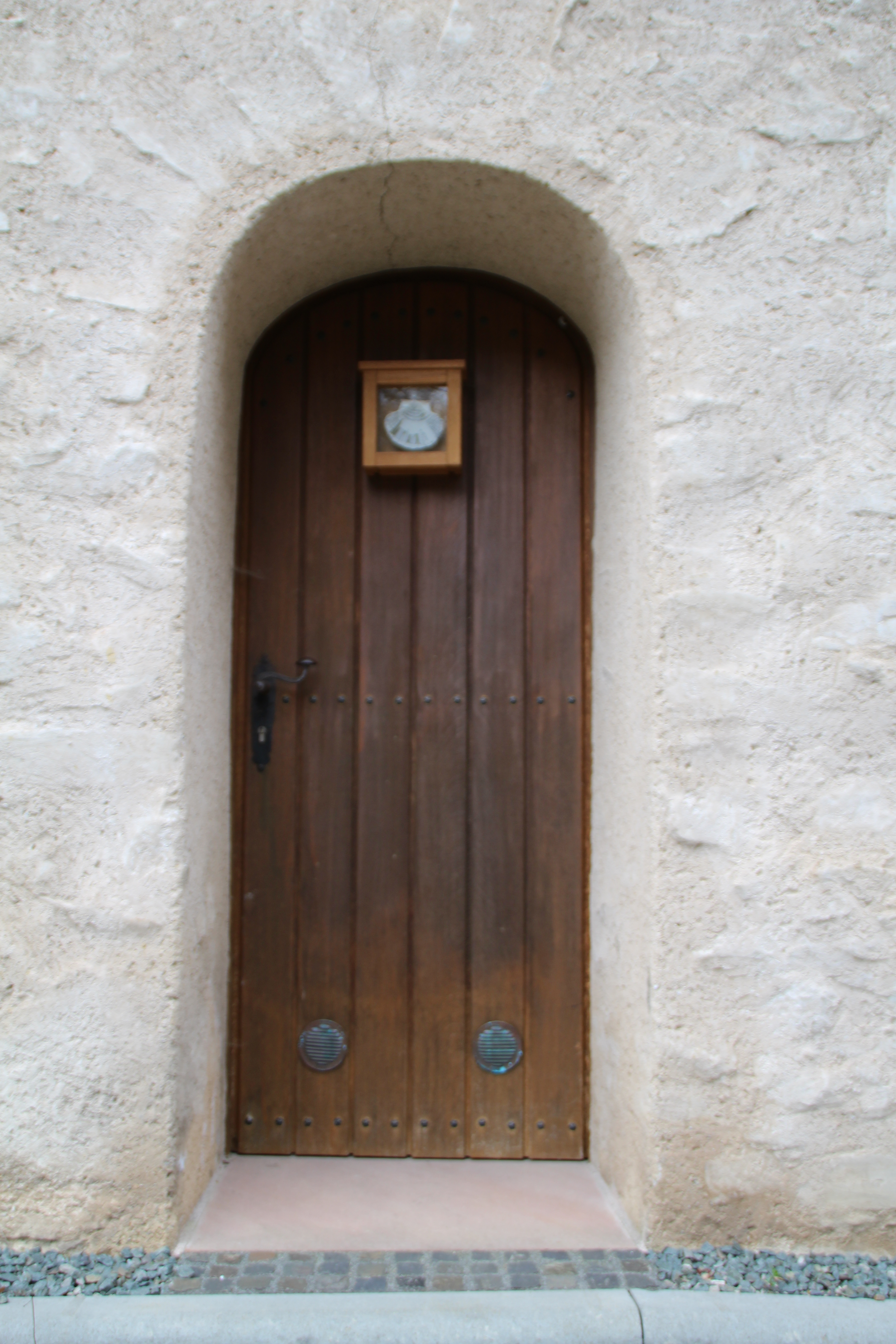 Alte Ev. Kirche